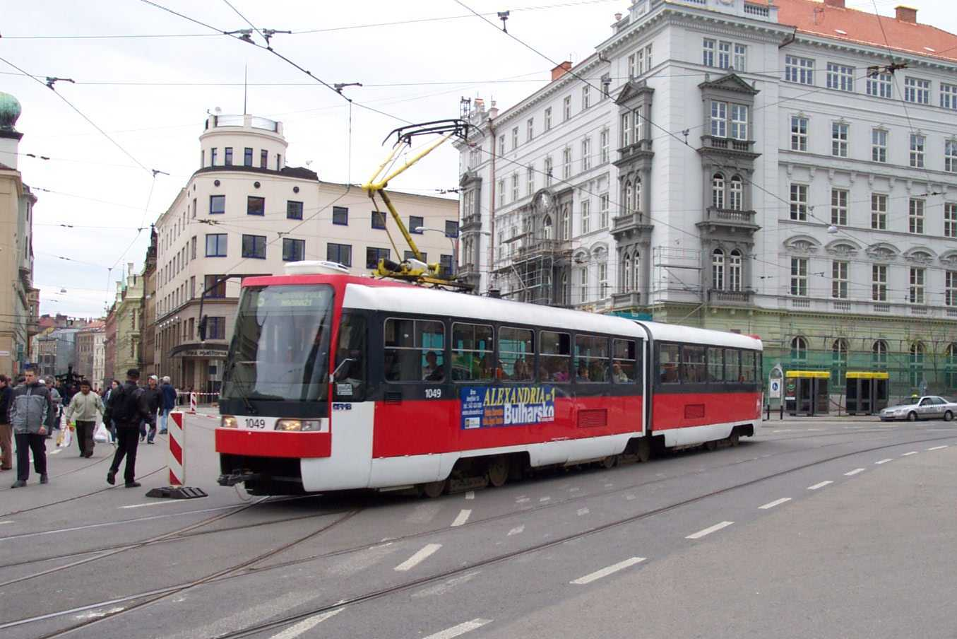 Tram type K2R in Brno - Tramvaj typu K2R v Brnu